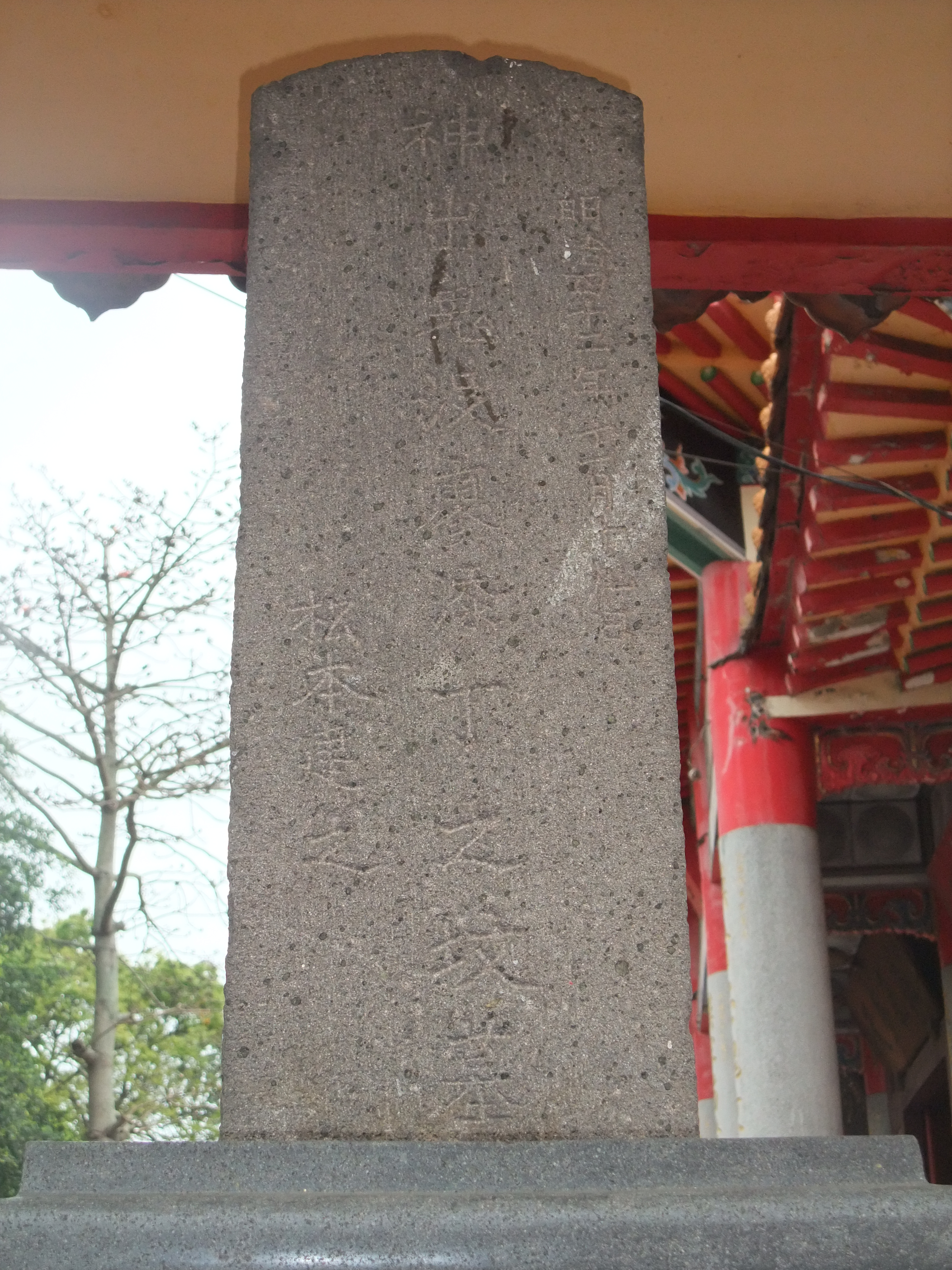 中文（台灣）: 廖添丁墓碑